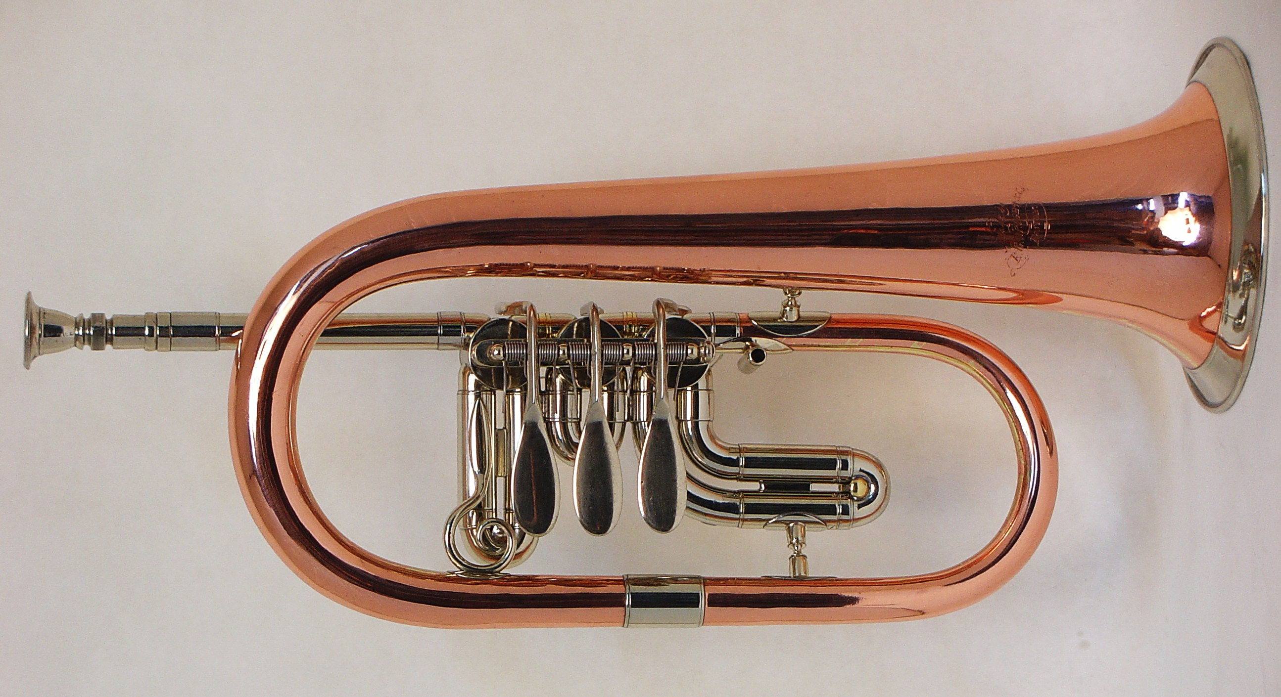 Saxhorn